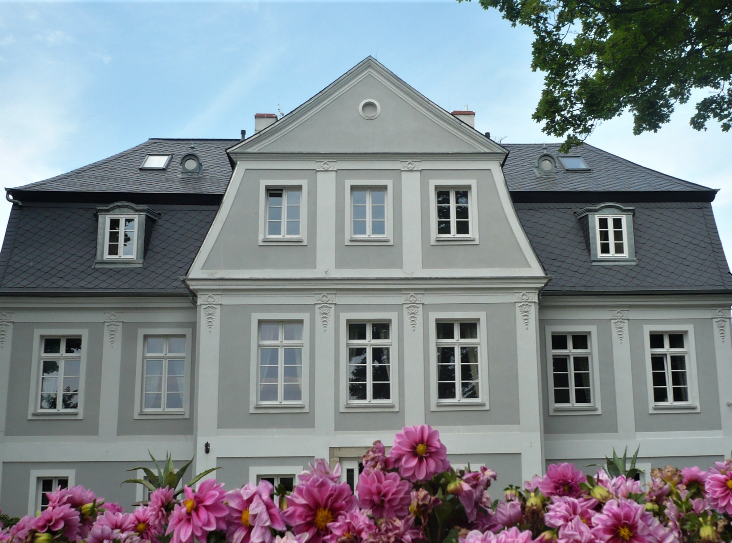 Pałac w Kamieńcu